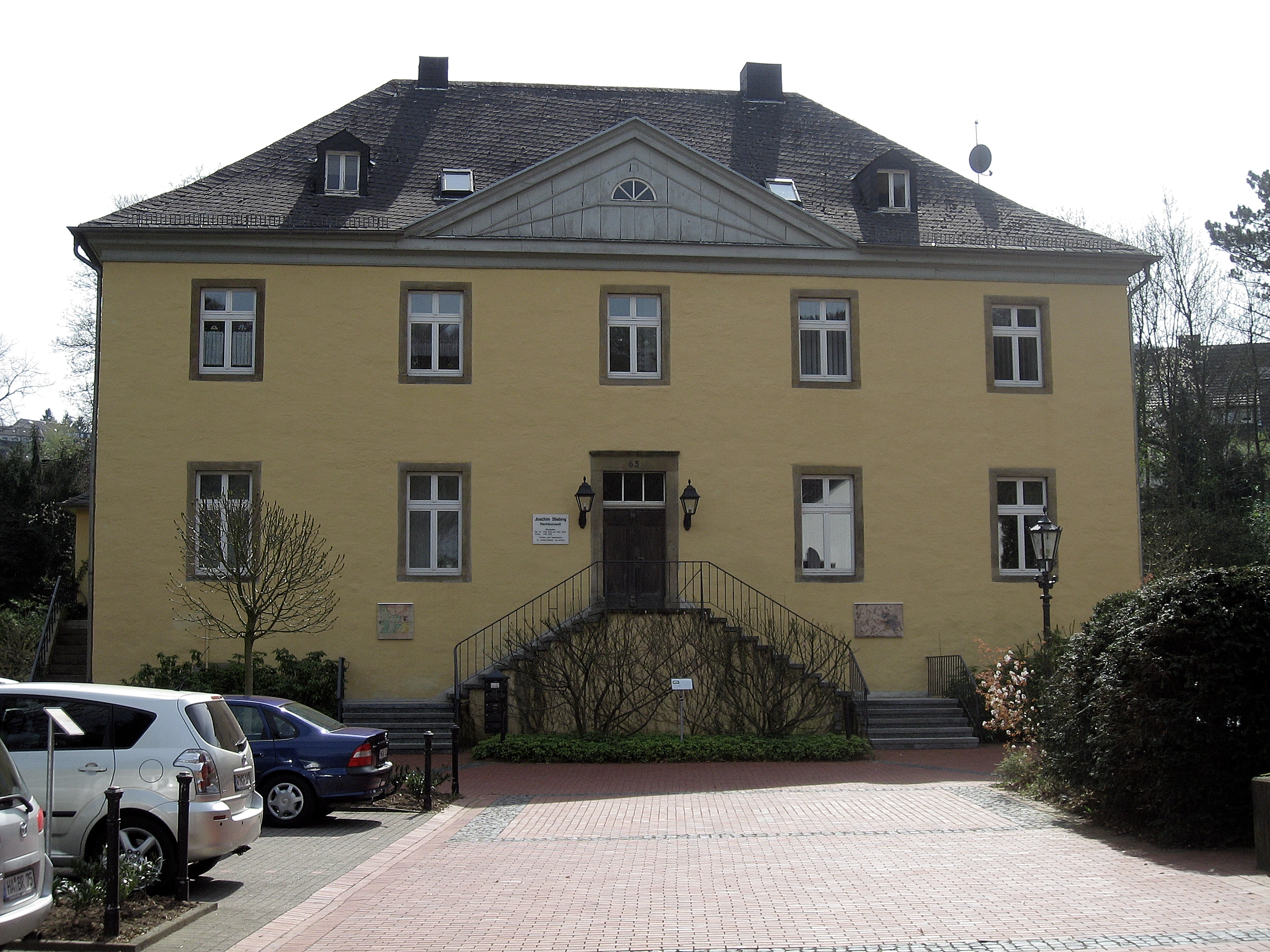 Deutschland, NRW, Westfalen, Haus Dahl, Hagen-Dahl